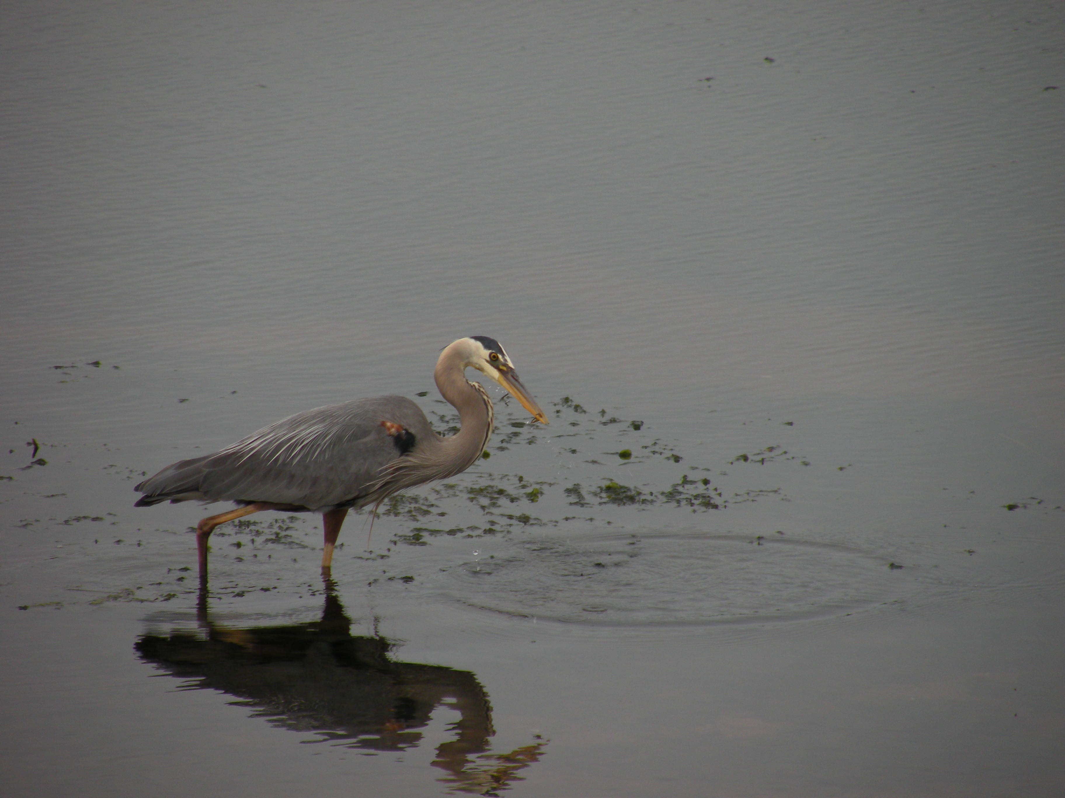 Un Grand héron (Ardea herodias) mangeant un poisson à Caraquet.